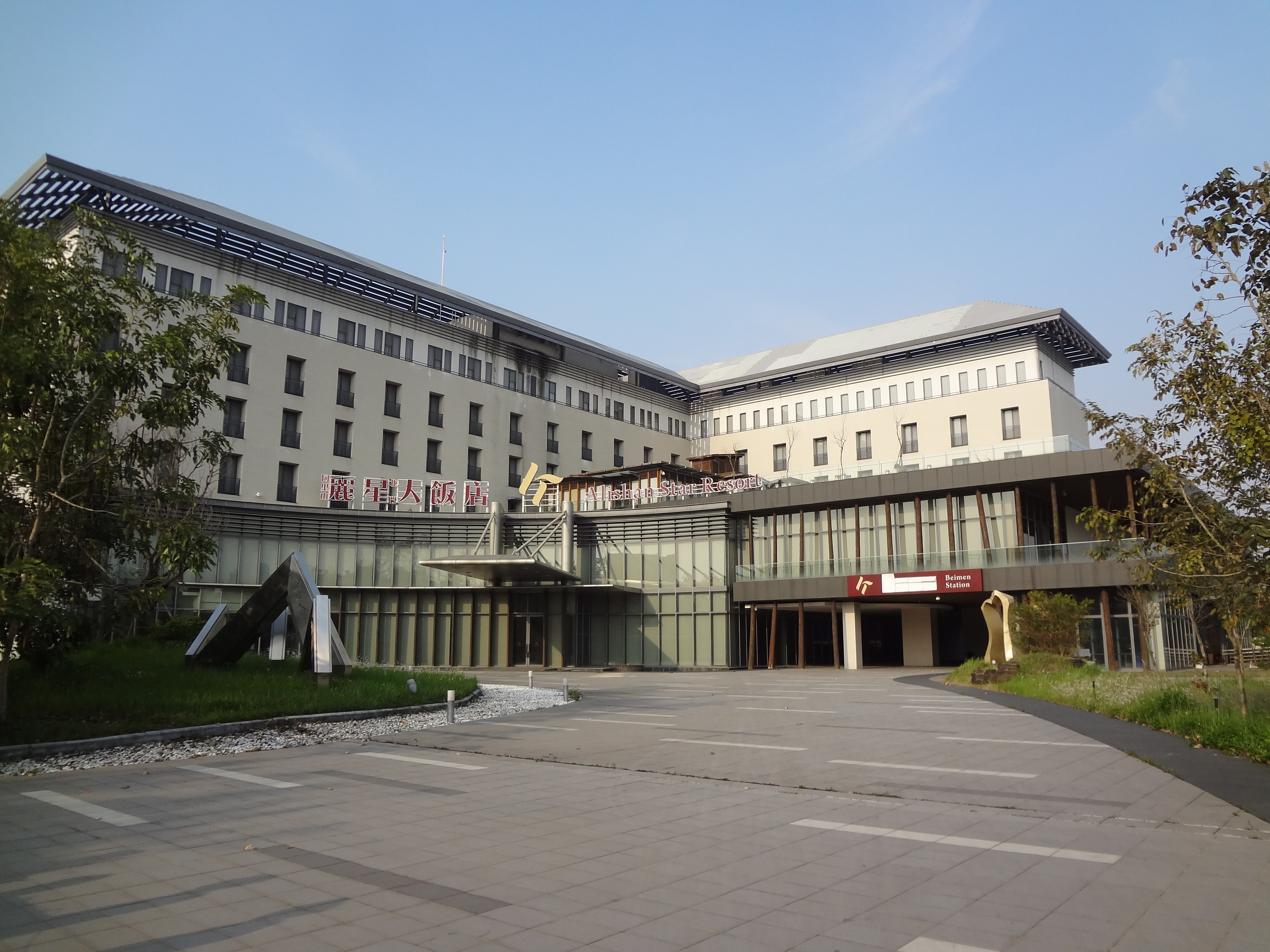 中文（台灣）: 阿里山麗星北門大飯店，位於嘉義市東區忠孝路306號，興建至今未曾啟用。